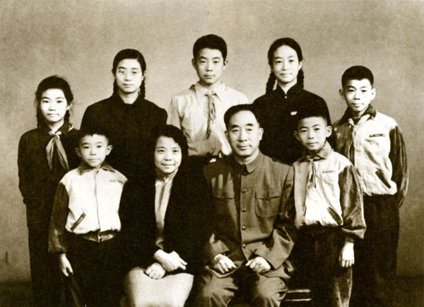 资料图片：薄一波、胡明和子女合影